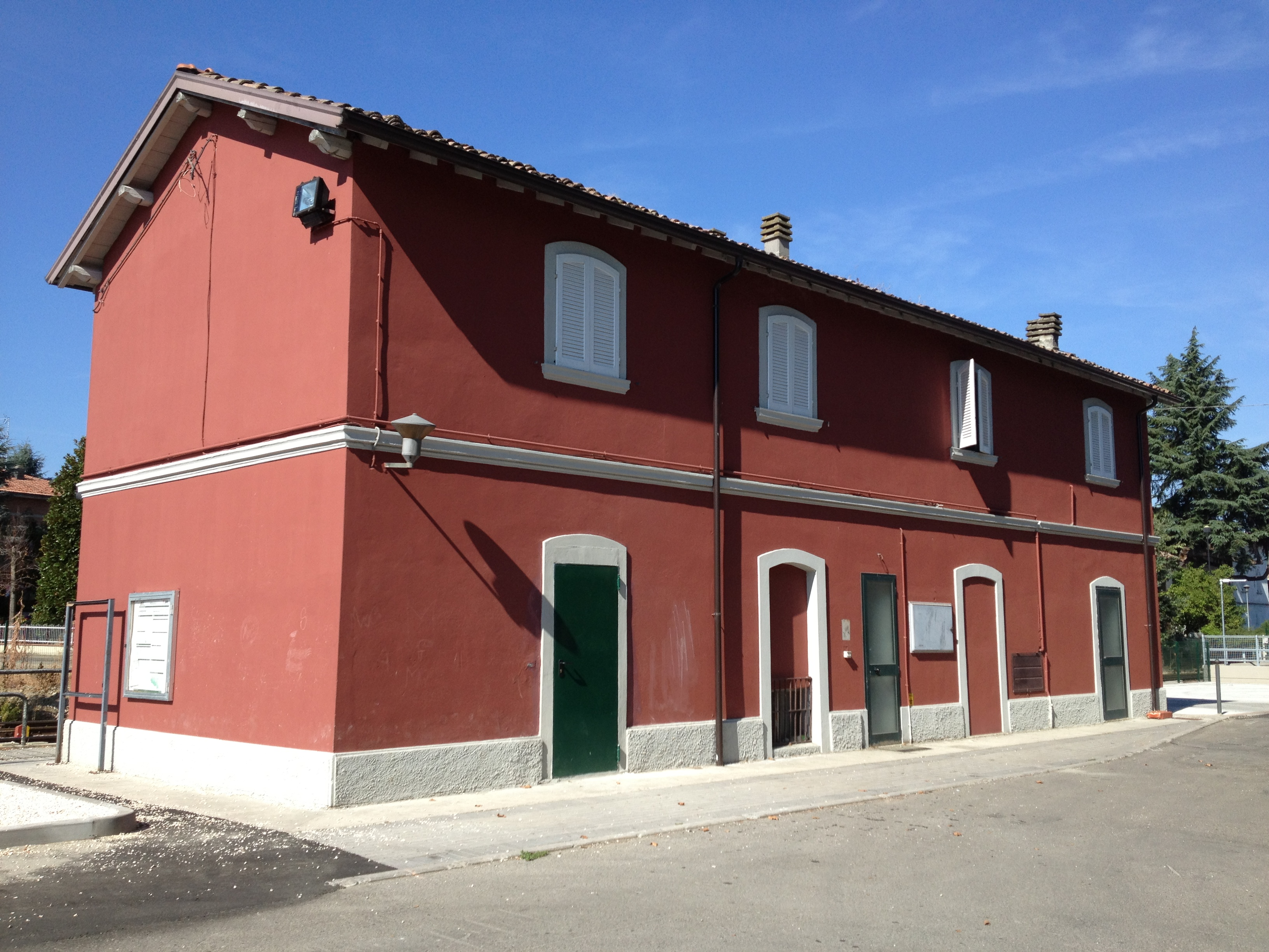 La stazione di Casalgrande, provincia di Reggio nell'Emilia.